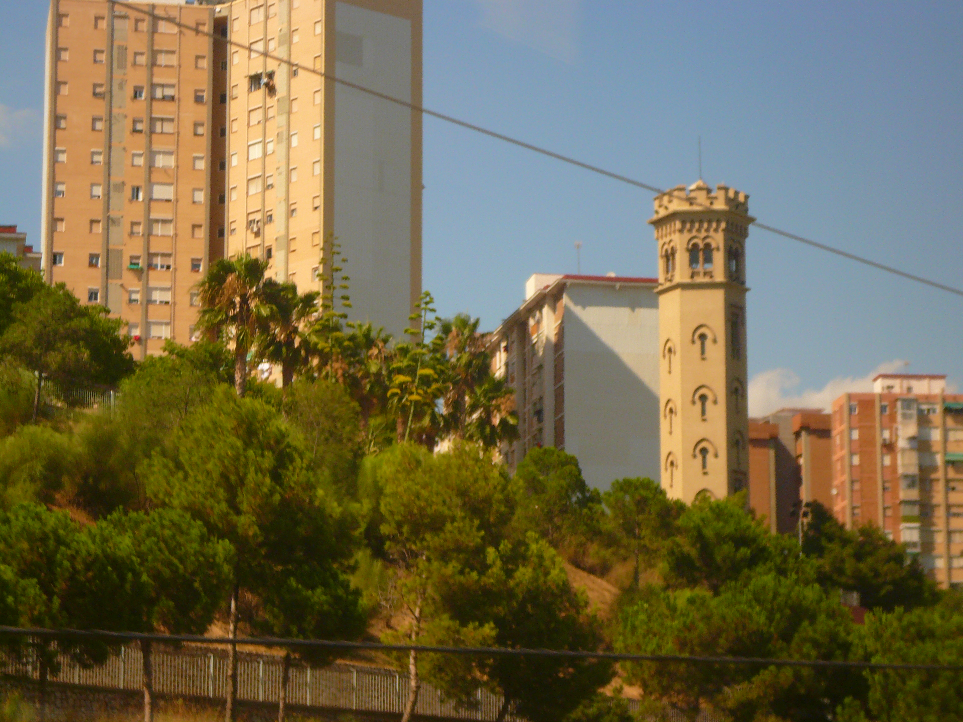 Torre de la Miranda (Cornellà de Llobregat) Object location41° 21′ 36.76″ N, 2° 05′ 04.99″ E